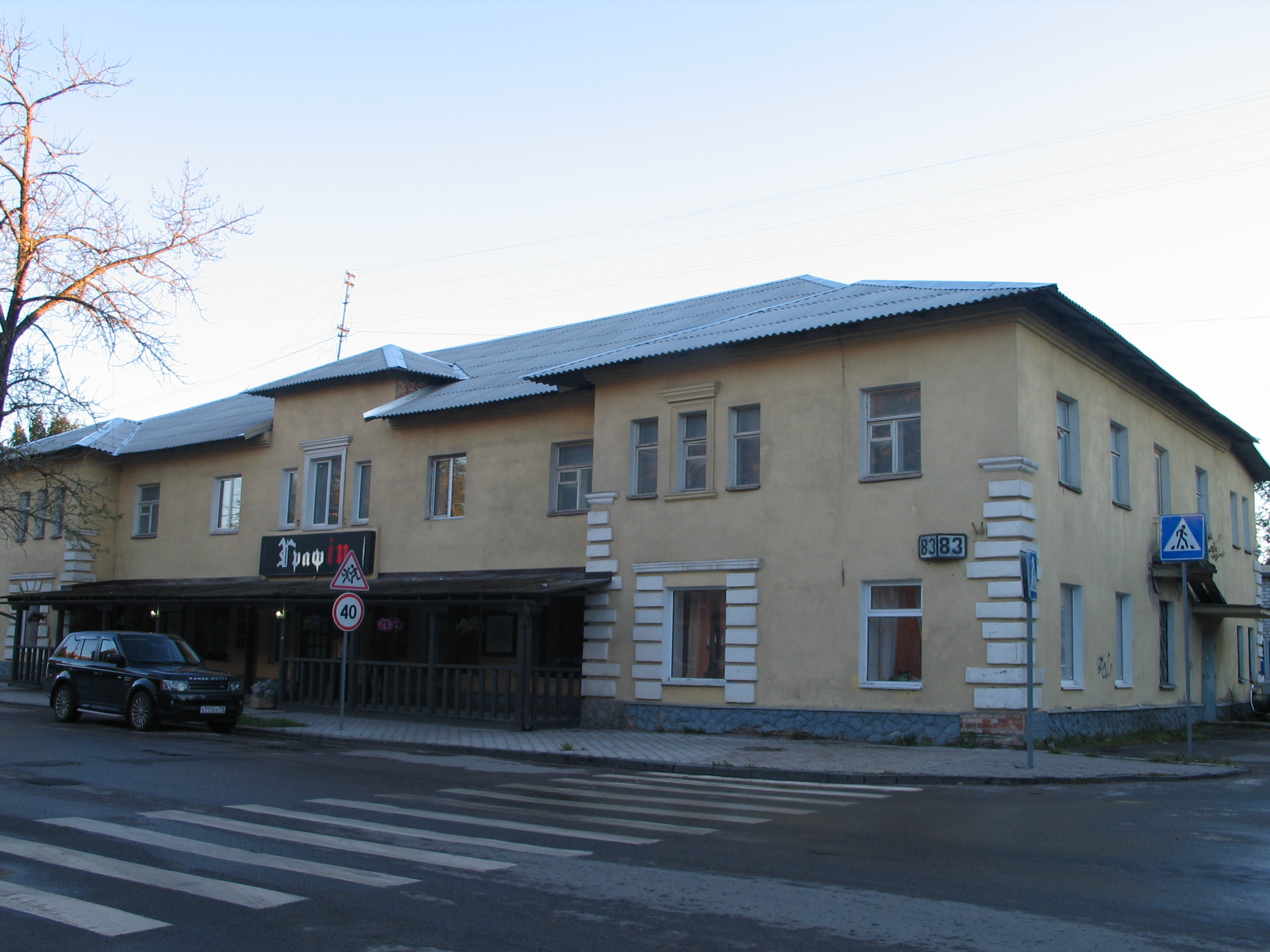 Ресторан на ул. Советской во Пскове